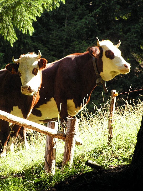 "Abondance" cattle.